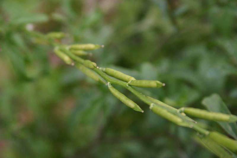 Rocket Salad, Arugula, Roquette, Rucola, Rugula (Eruca vesicaria subsp. sativa)